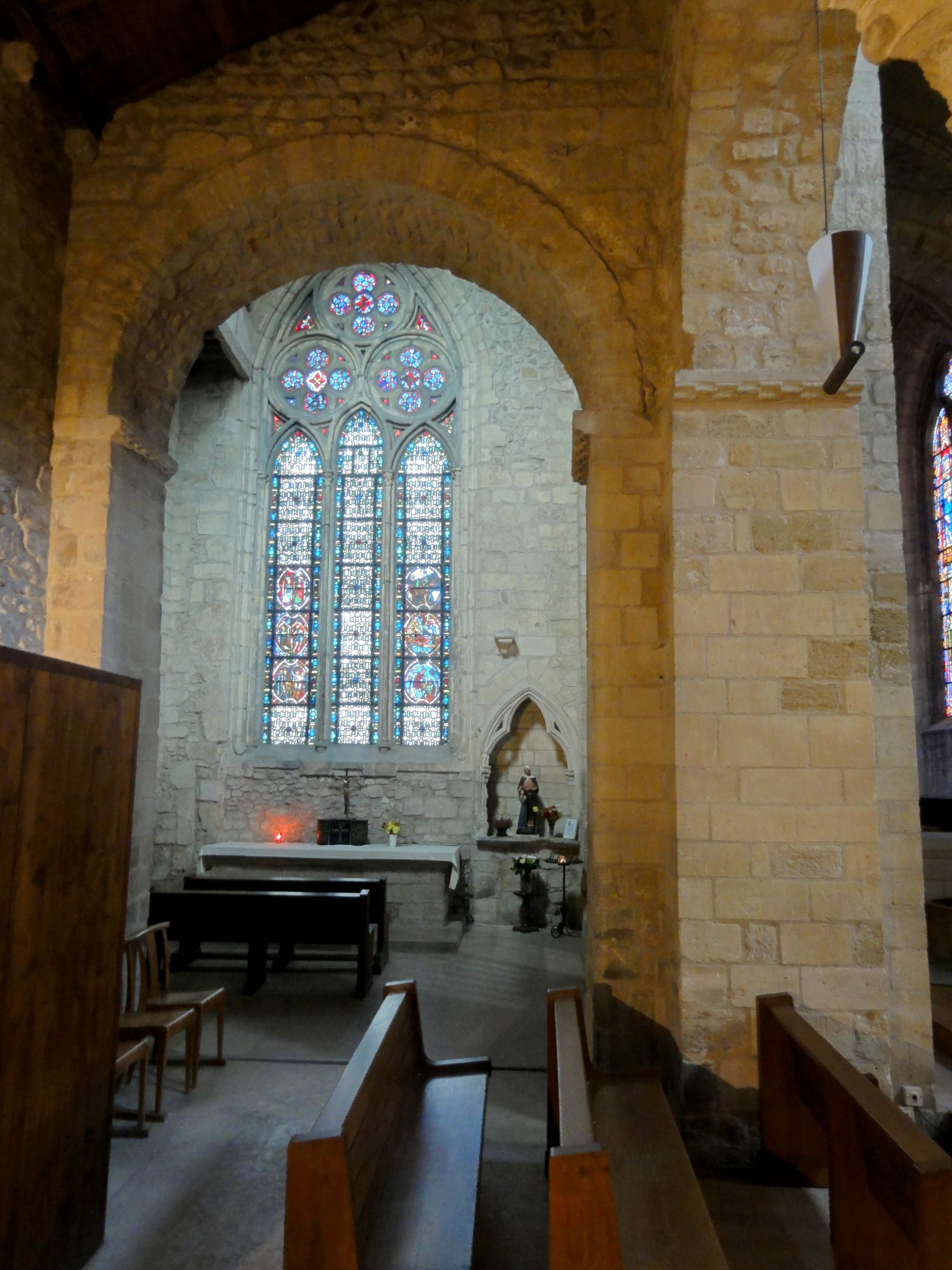 Intérieur de l'église (voir titre).